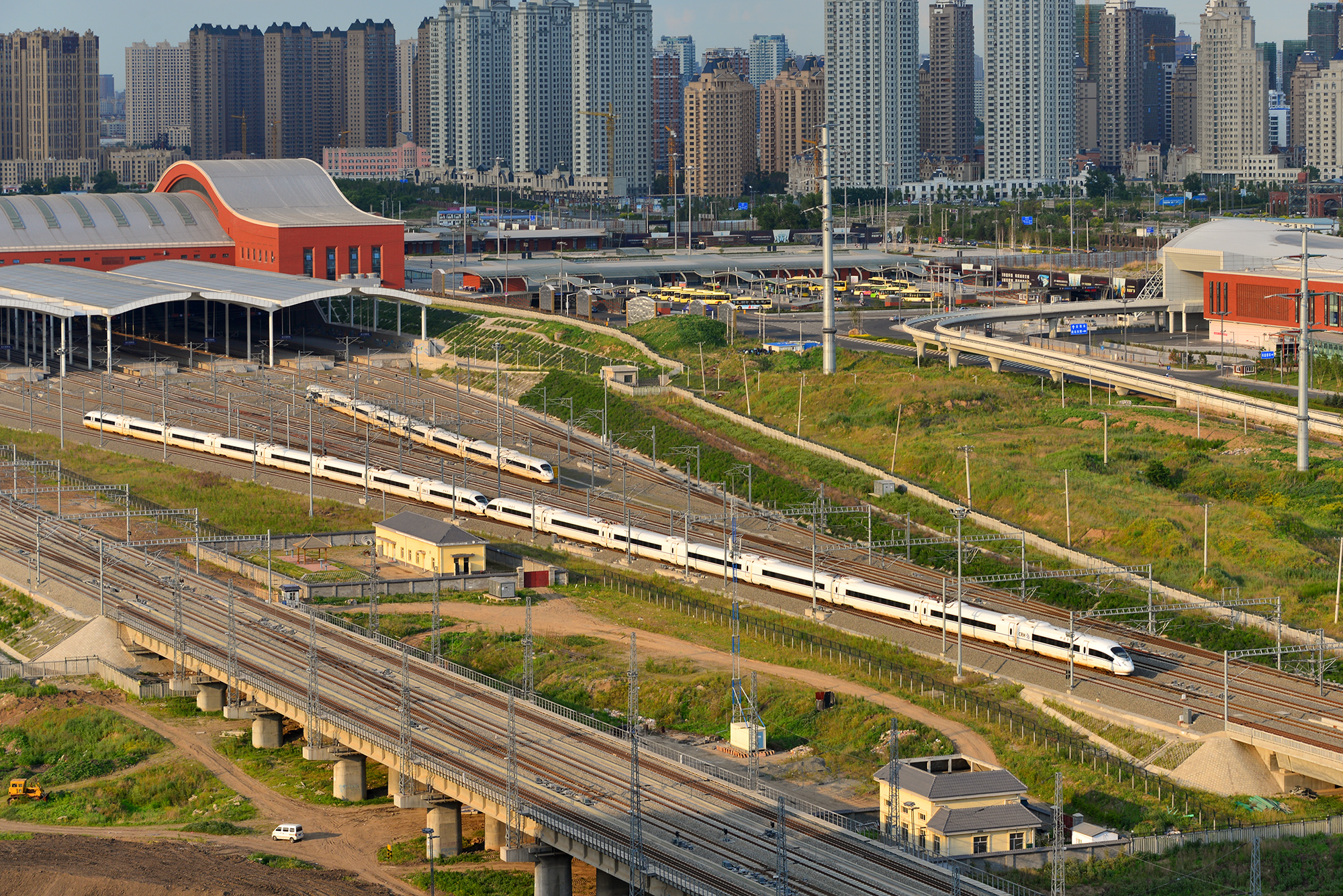 Nangang, Harbin, Heilongjiang, China